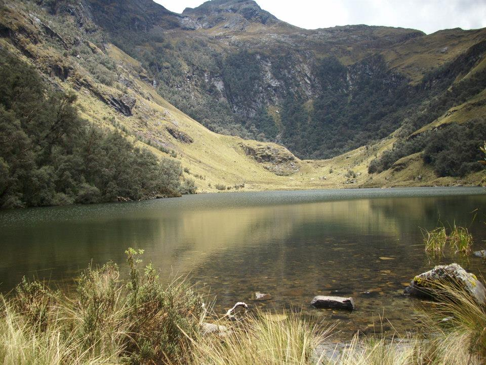 Laguna Aywinyag